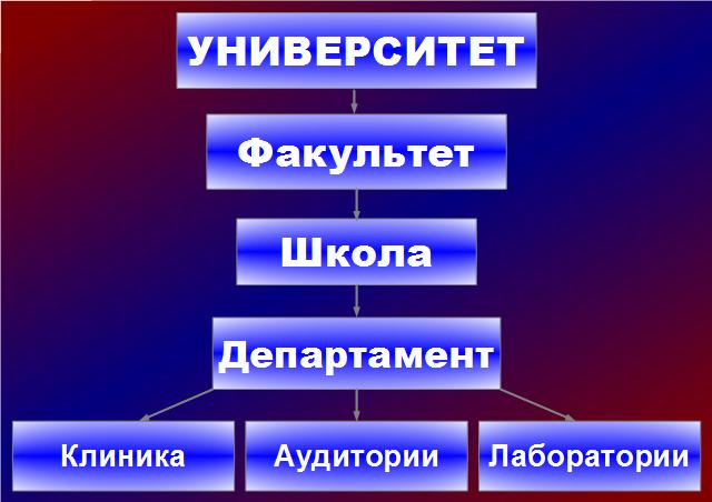 Схема